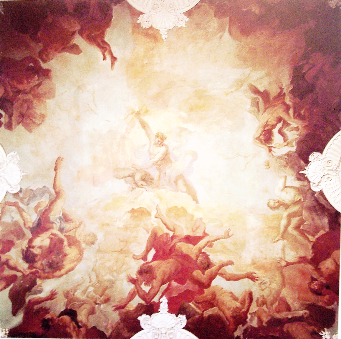 Domenico Zanetti, venezianischer Maler ( tätig nach1694; gestorben nach 1712) Kuppelfresko im ehemaligen Treppenhaus des Schlosses Bensberg, Zanetti-Saal: Sturz der Giganten.JPG